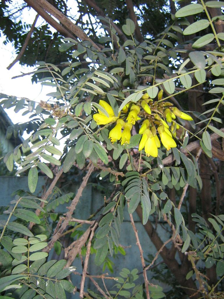 Sophora macrocarpa "mayu", ex hortus